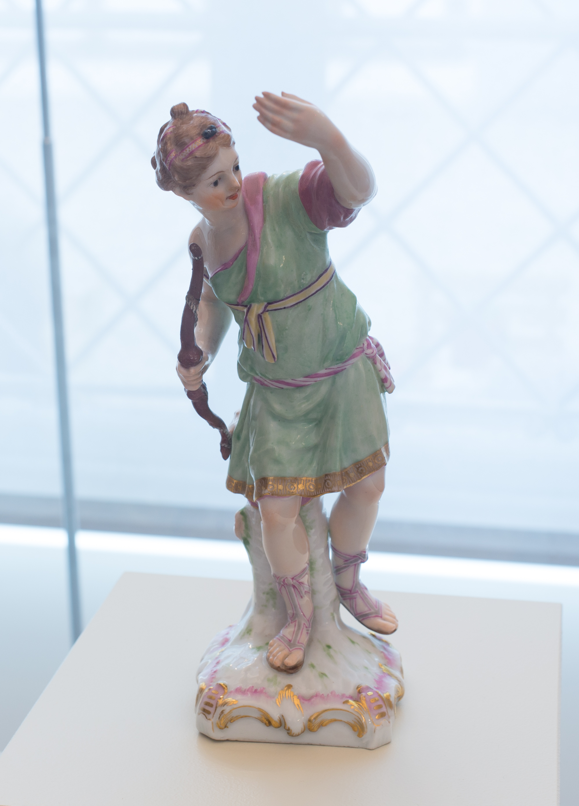 Wilhelm Cristian Meyer Diana um 1769 Königliche Porzellanmanufaktur, Berlin KPM-Porzellanmanufaktur des Landes Berlin Der Bogen und der Köcher mit Pfeilen auf ihrem Rücken weisen die Figuren als Diana aus. Auf ihrem Kopf trug sie wahrscheinlich einen Halbmond, wie er bei Darstellung der Diana üblich war, denn sie war nicht nur die Göttin der Jagd, sondern auch des Mondes. Die Diana gehörte wohl zu einer Folge von Götterfiguren der KPM.